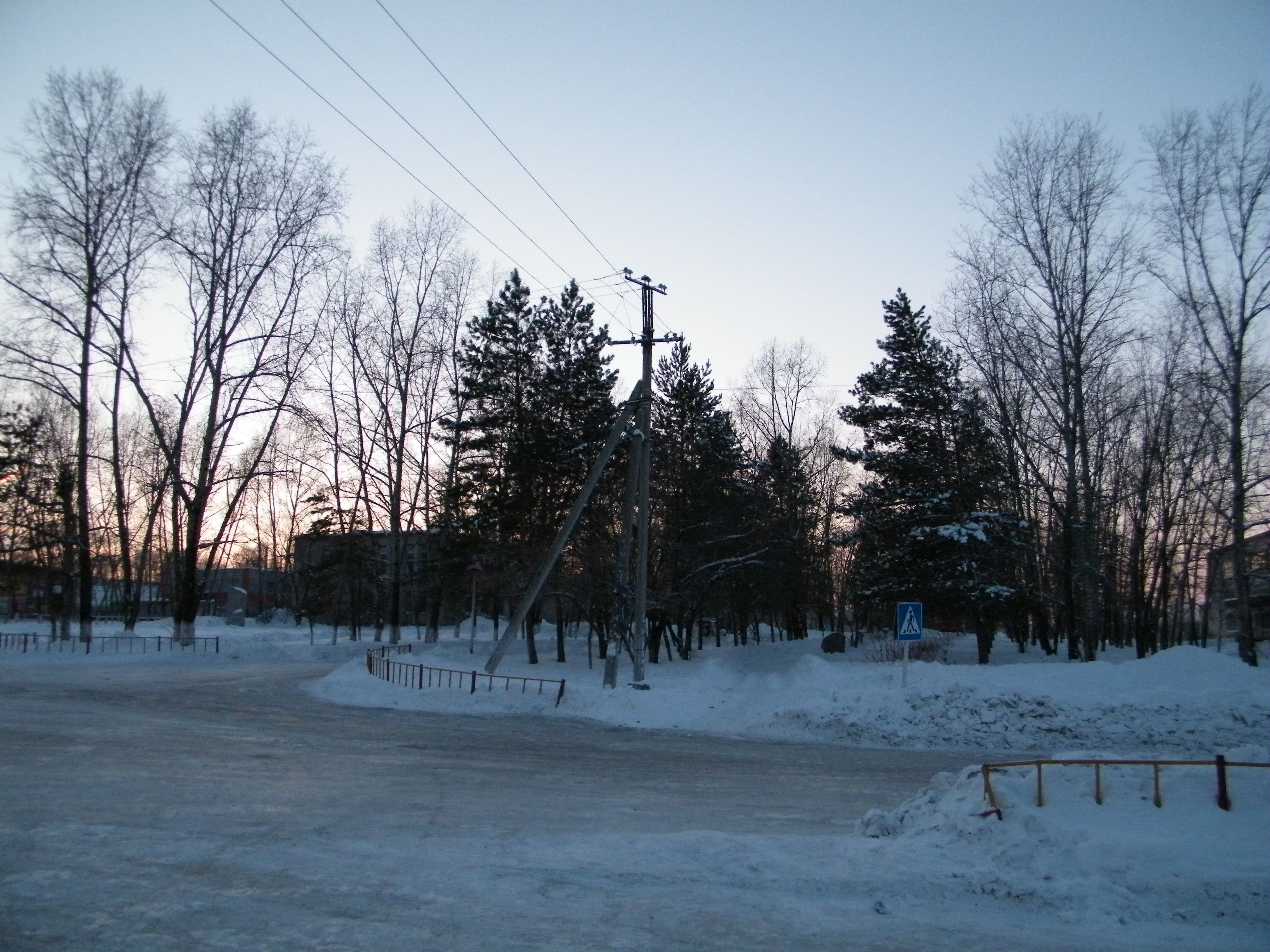 Село Некрасовка Хабаровский край